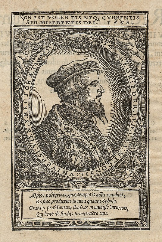 Original image description from the Deutsche Fotothek Universität & Rektor